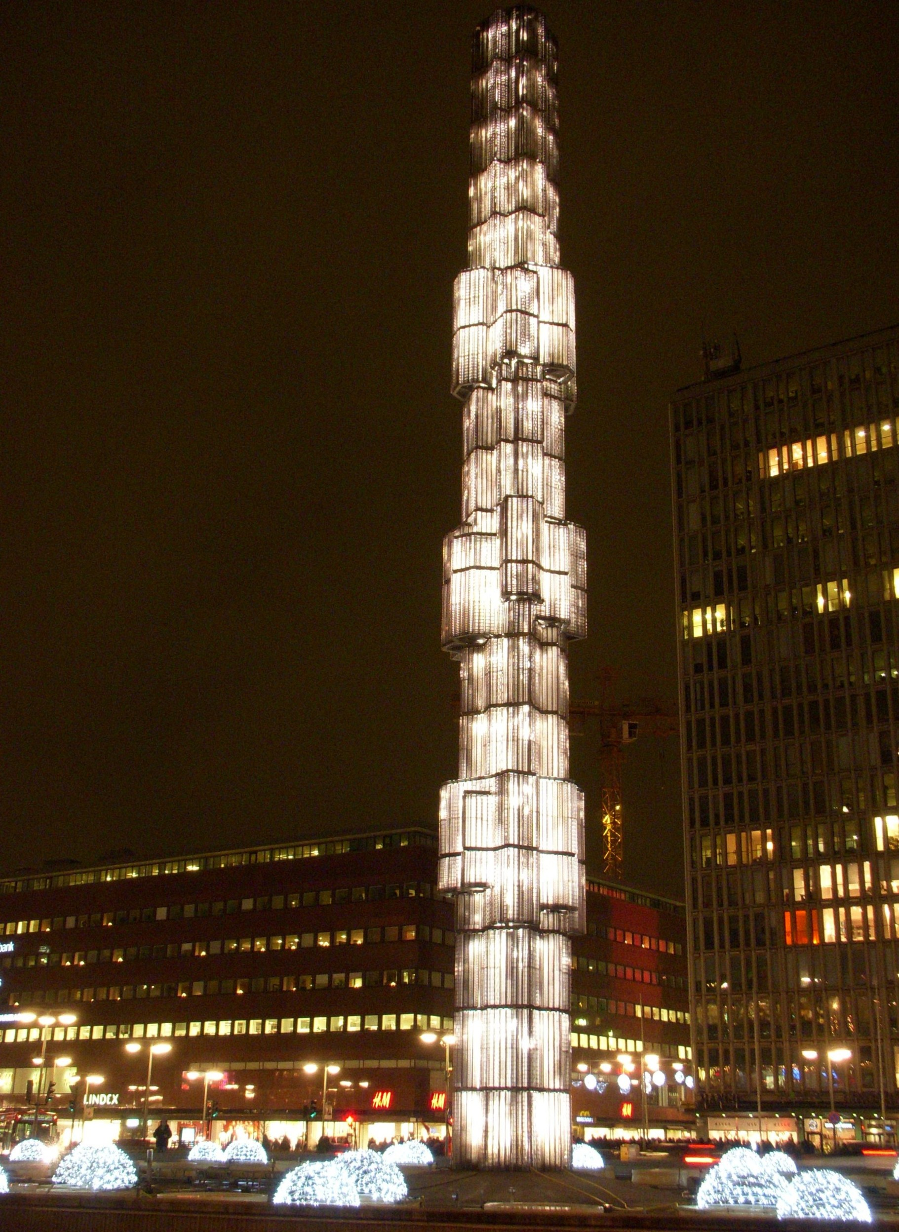 Glasobelisken av Edvin Öhrström på Sergels torg i Stockholm